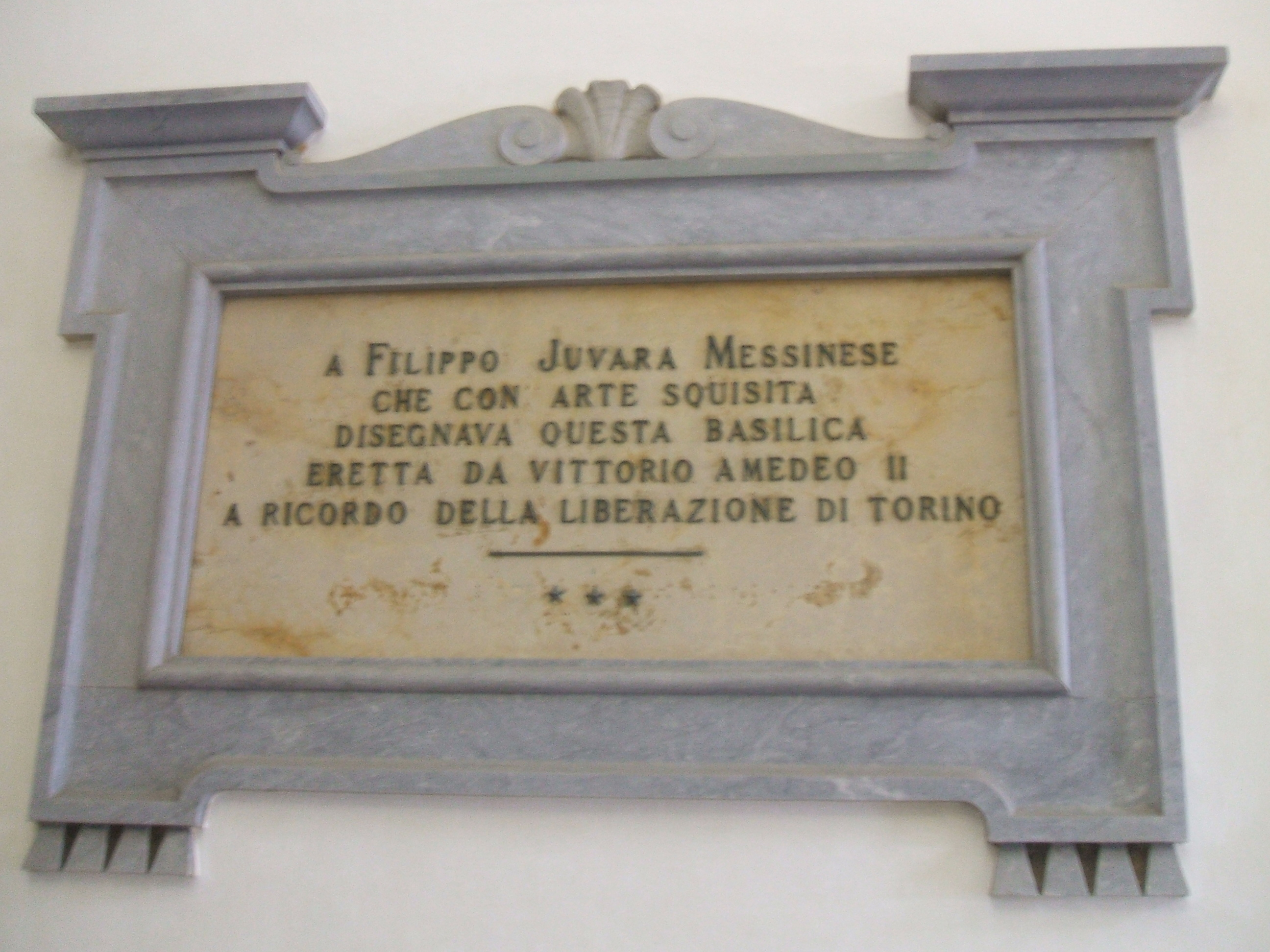 Lapide presente nella Basilica di Superga